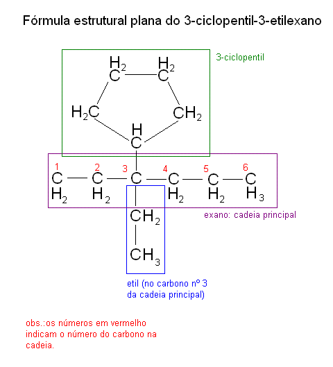 Estrutura do 3-ciclopentil-3-etilexano